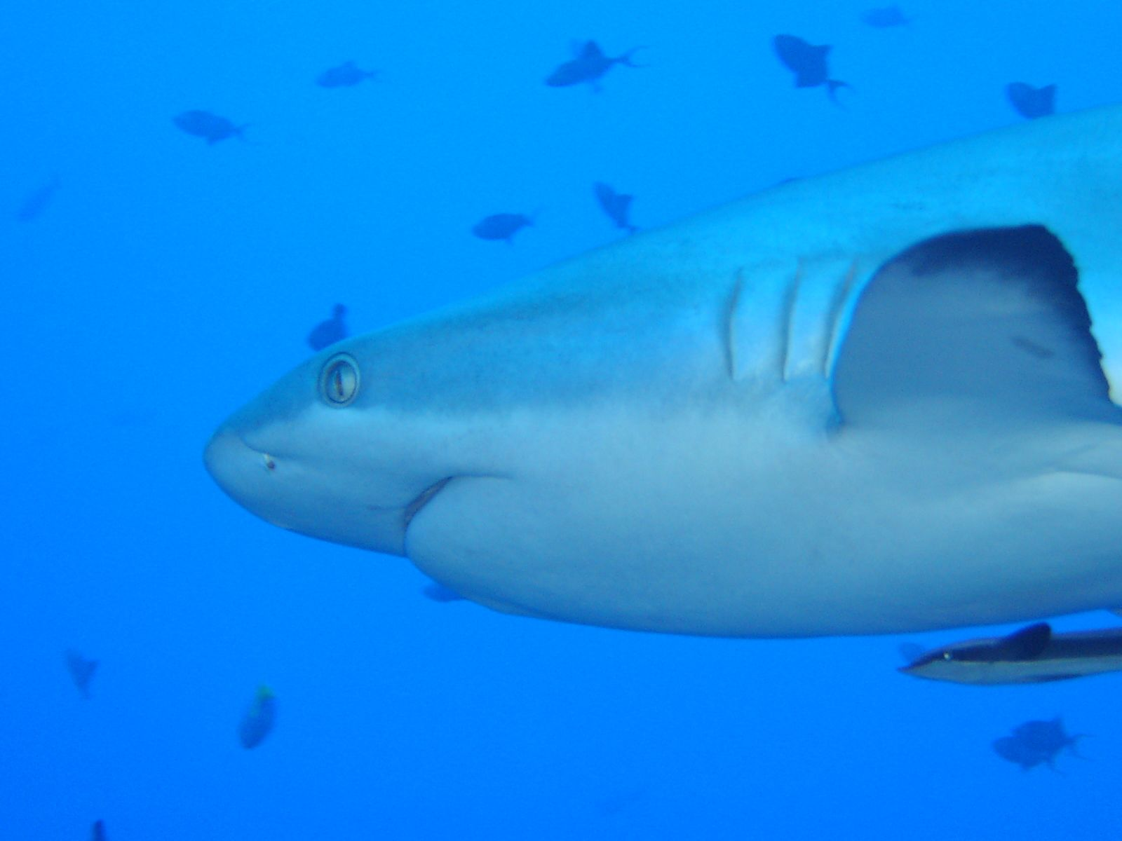 Palau, Blue Corner Carcharhinus amblyrhynchos